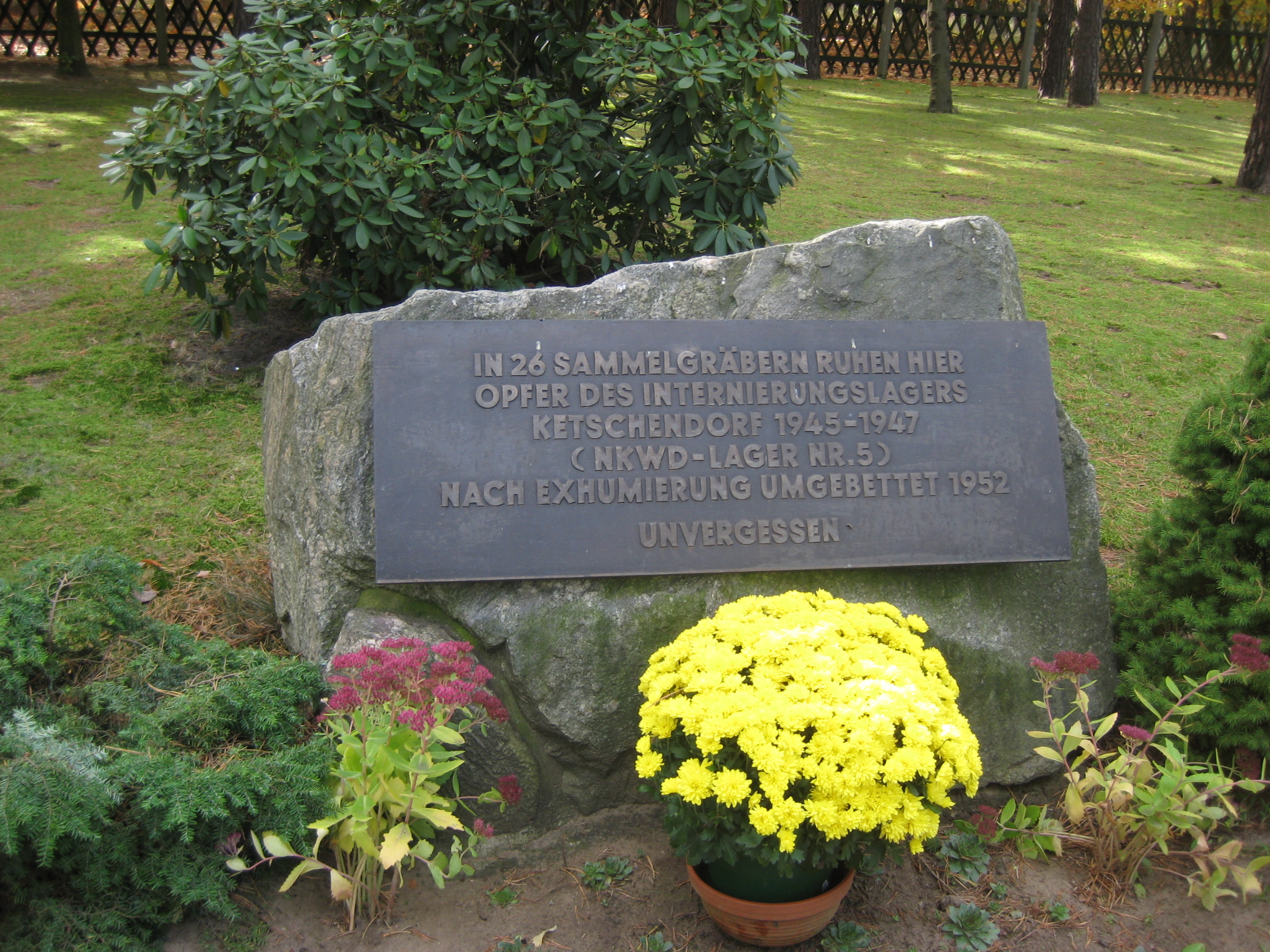 Waldfriedhof Halbe - Denkmal für NKWD-Opfer